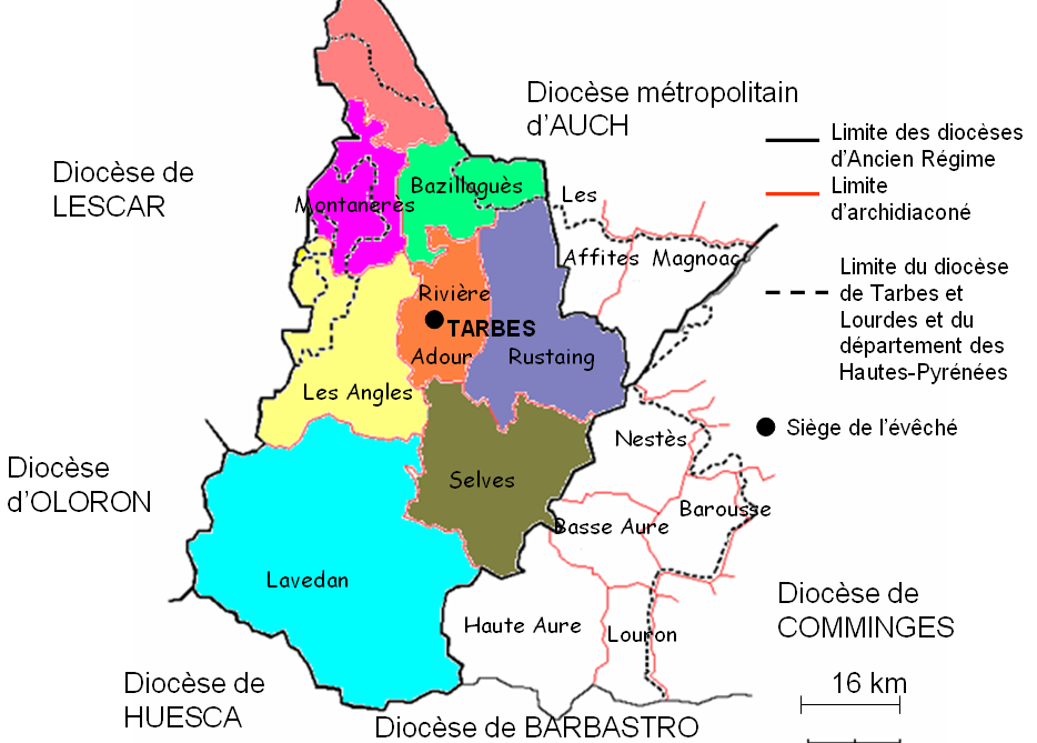 Limites des huit archidiaconés de l'ancien évêché de Bigorre sous l'Ancien Régime